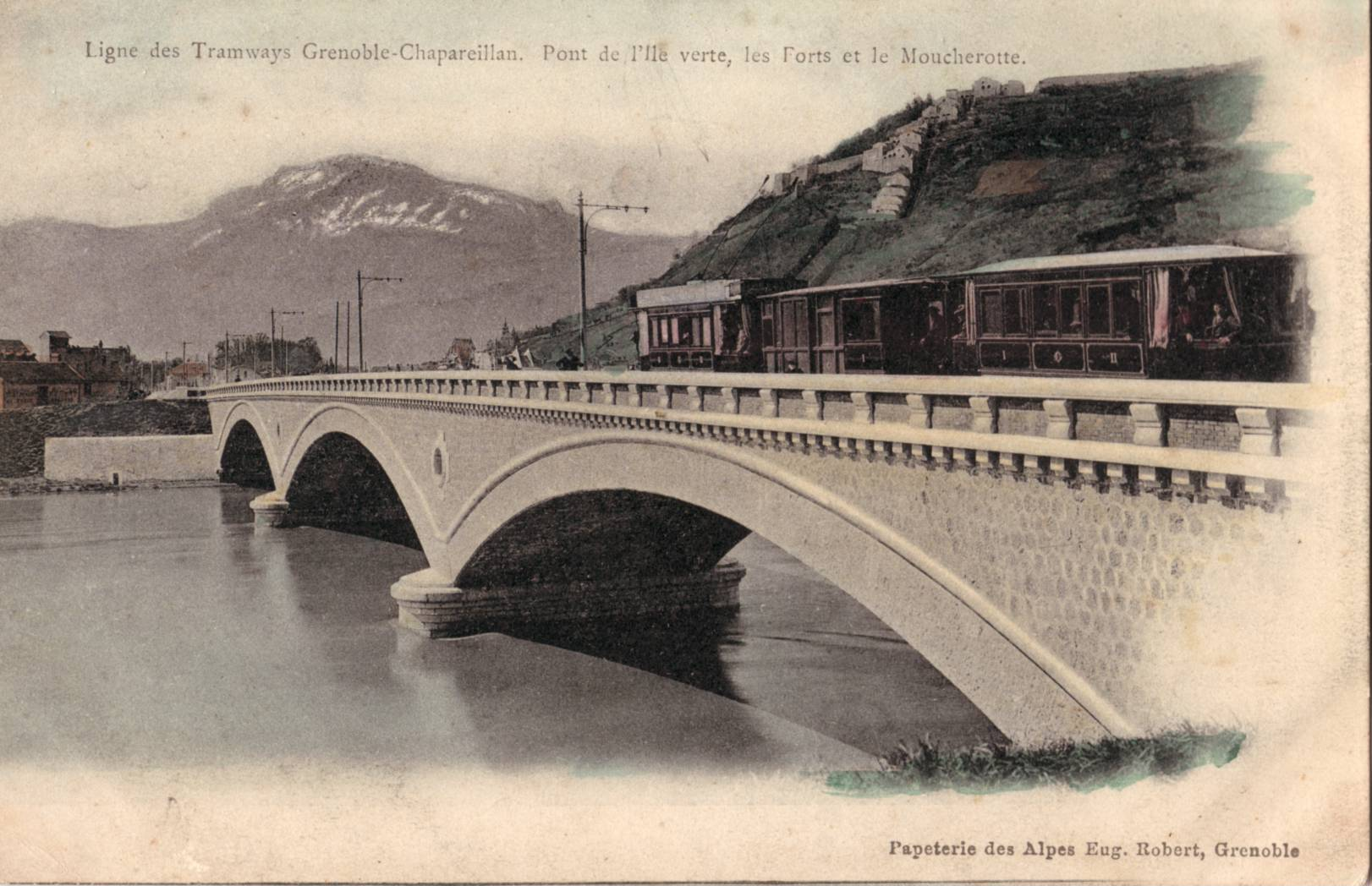 Carte postale ancienne éditée par papèterie des Alpes GRENOBLE : rame du tramway Grenoble - Chapareillan sur le Pont de l'Île Verte